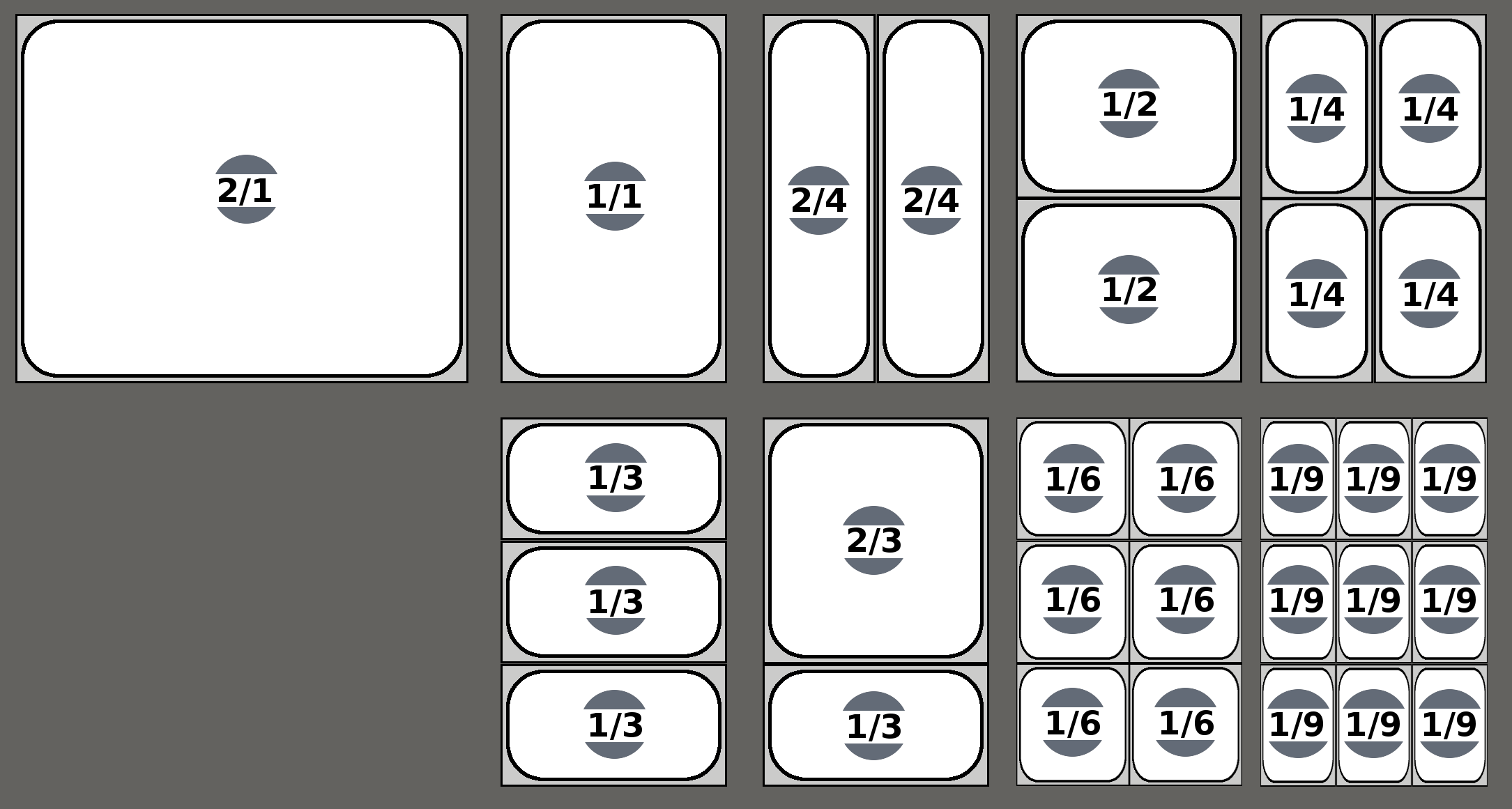 Bacs gn